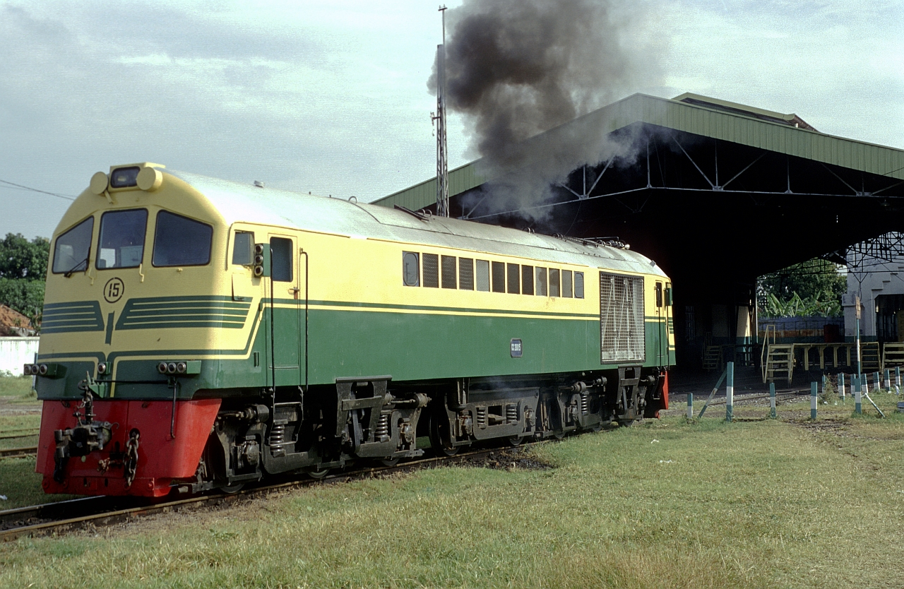 PTKACC200 (200 15 C)